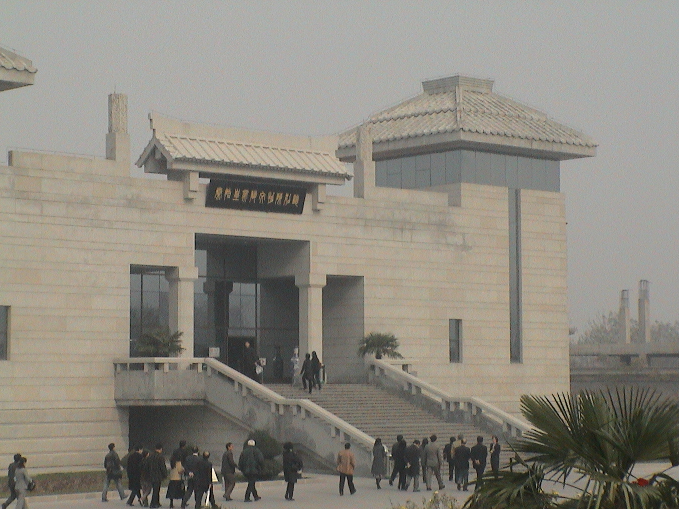 View of the museum of Terracotta Army dies ist der Eingang zur Halle 5, in der "nur" die Befehlshaber und ihre Pferde ausgestellt sind. Die Haupthalle beinhaltet das gros der Terakottaarmee!